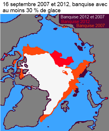 Surface de la banquise le 16 septembre 2007 et 2012 avec au moins 30 % de glace. En blanc : banquise 2007 et 2012. en orange : banquise 2007 et en rouge : banquise en 2012. La surface de la banquise 2012 bat le record de 2007 car en 2012 la banquise a fondu plus vite qu'en 2007.